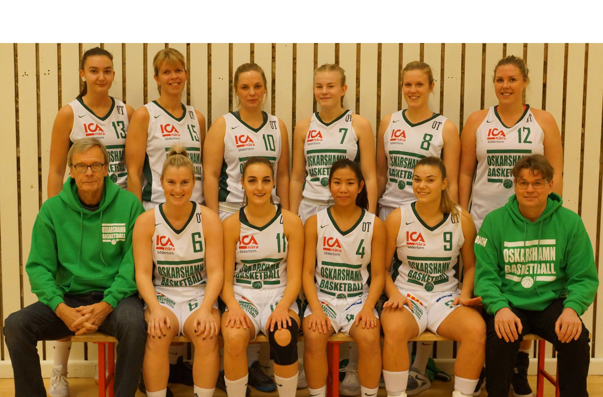 Lagfoto på damlaget säsongen 2017/18